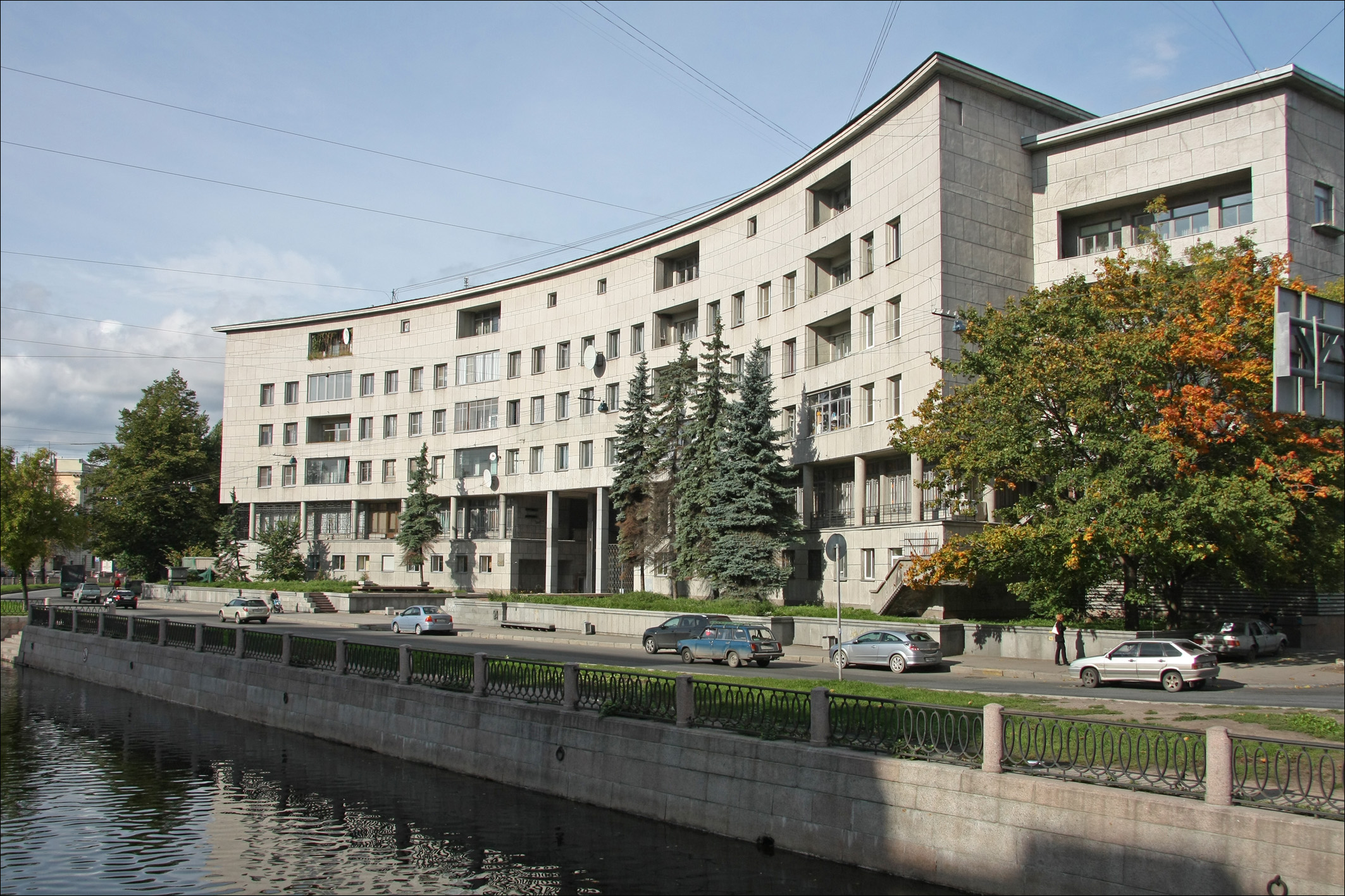 Первый жилой дом Ленсовета: набережная р. Карповки, 13, улица Литераторов, 10, Петроградский район, Санкт-Петербург